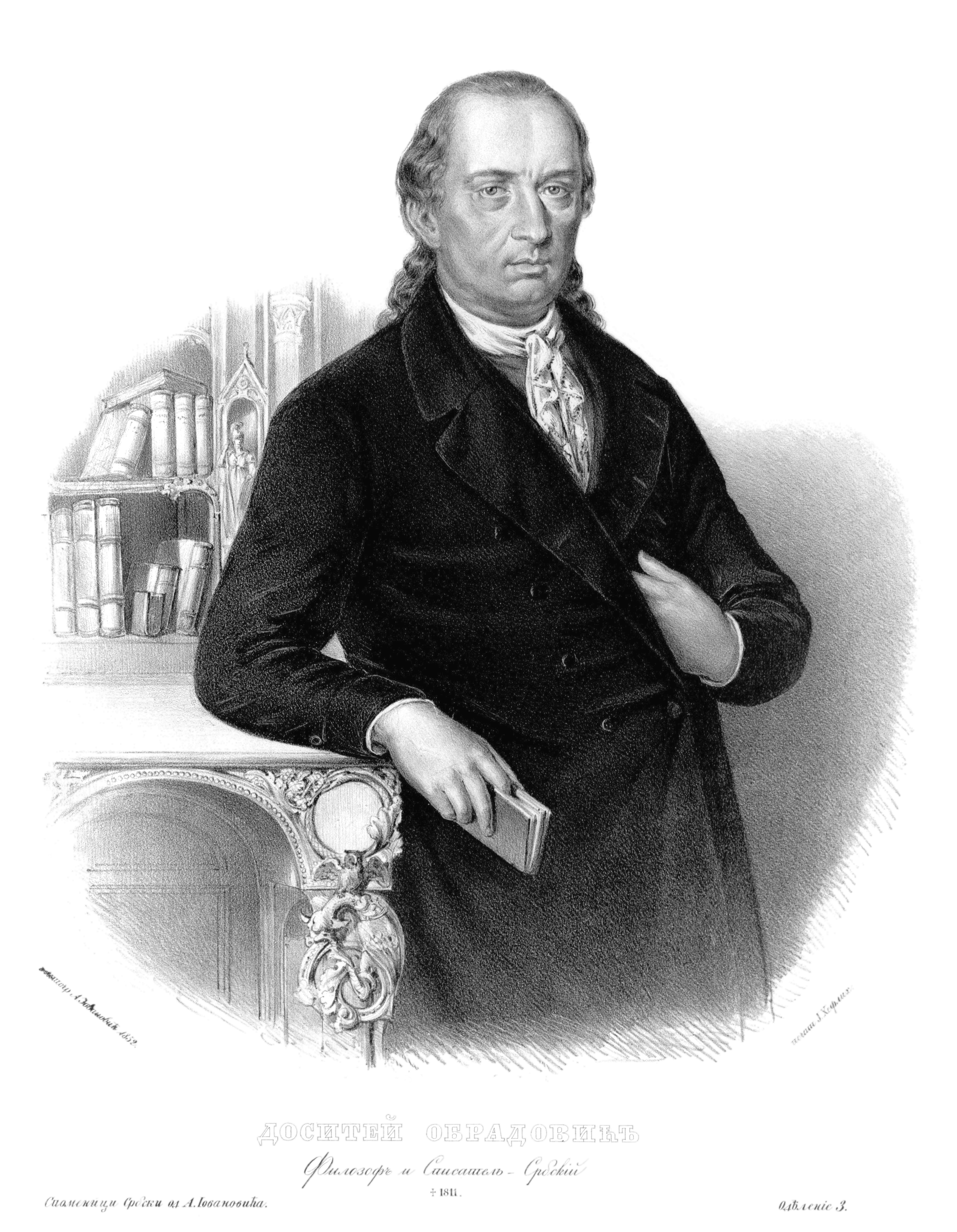 Lithograph of Dositej Obradović by Anastas Jovanović. Caption: литогр. А. Іовановић 1852.печат Ј. Хефлих. ДОСИТЕЙ ОБРАДОВИЋЪ Филозофъ и Списатель - Србскій +1811. Споменици Србски од А. Іовановића.Одѣленіе 3.